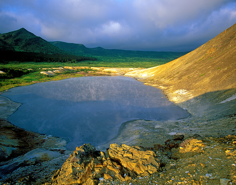 Курильский заповедник. Озеро Кипящее в кальдере вулкана Головнина на острове Кунашир